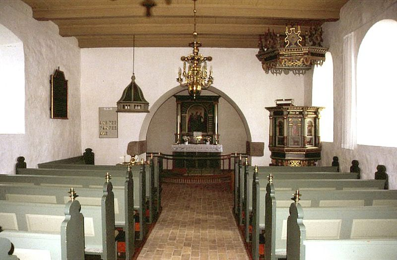 Blegind Kirke i Danmark. Skibet set mod øst